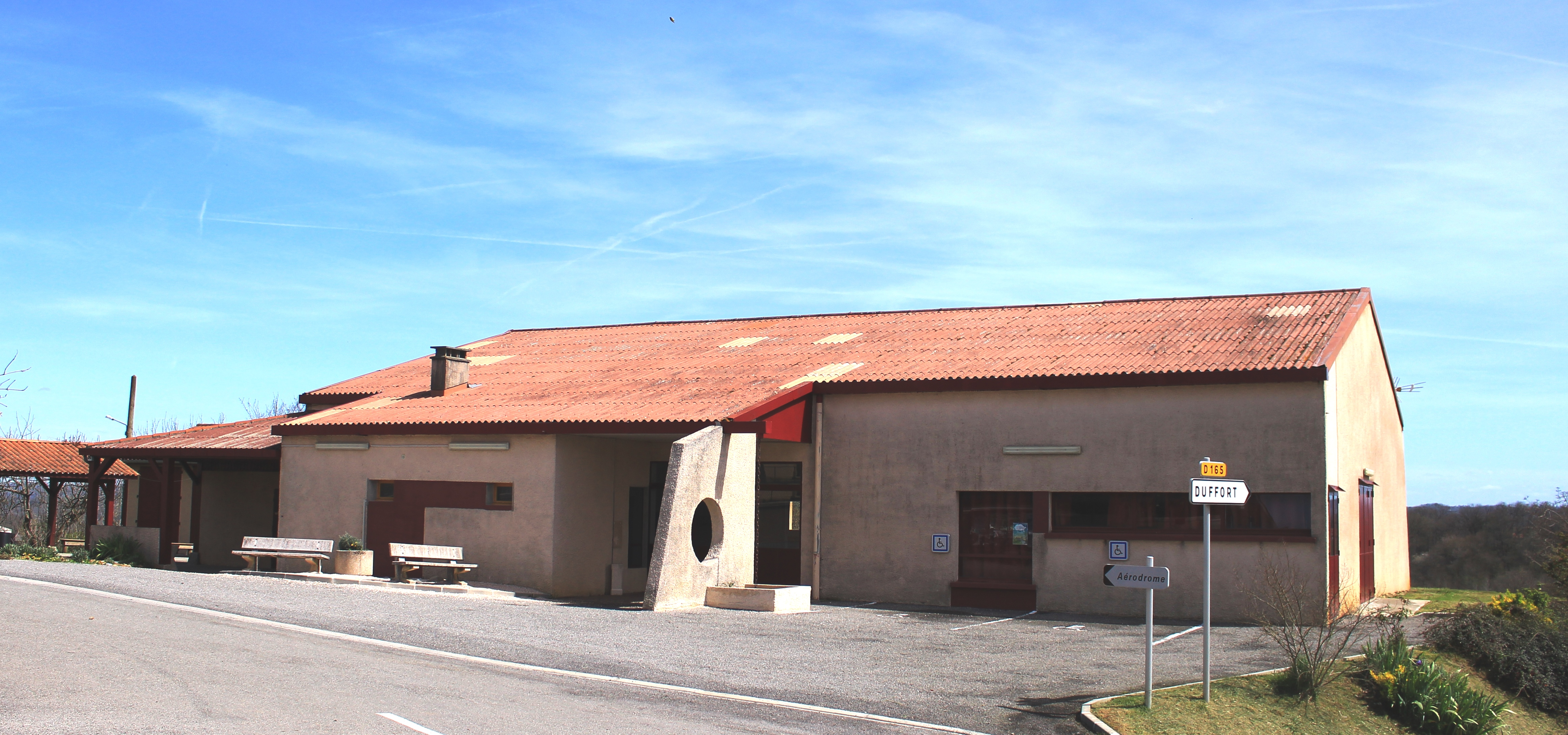 Salle des fêtes de Sadournin (Hautes-Pyrénées)